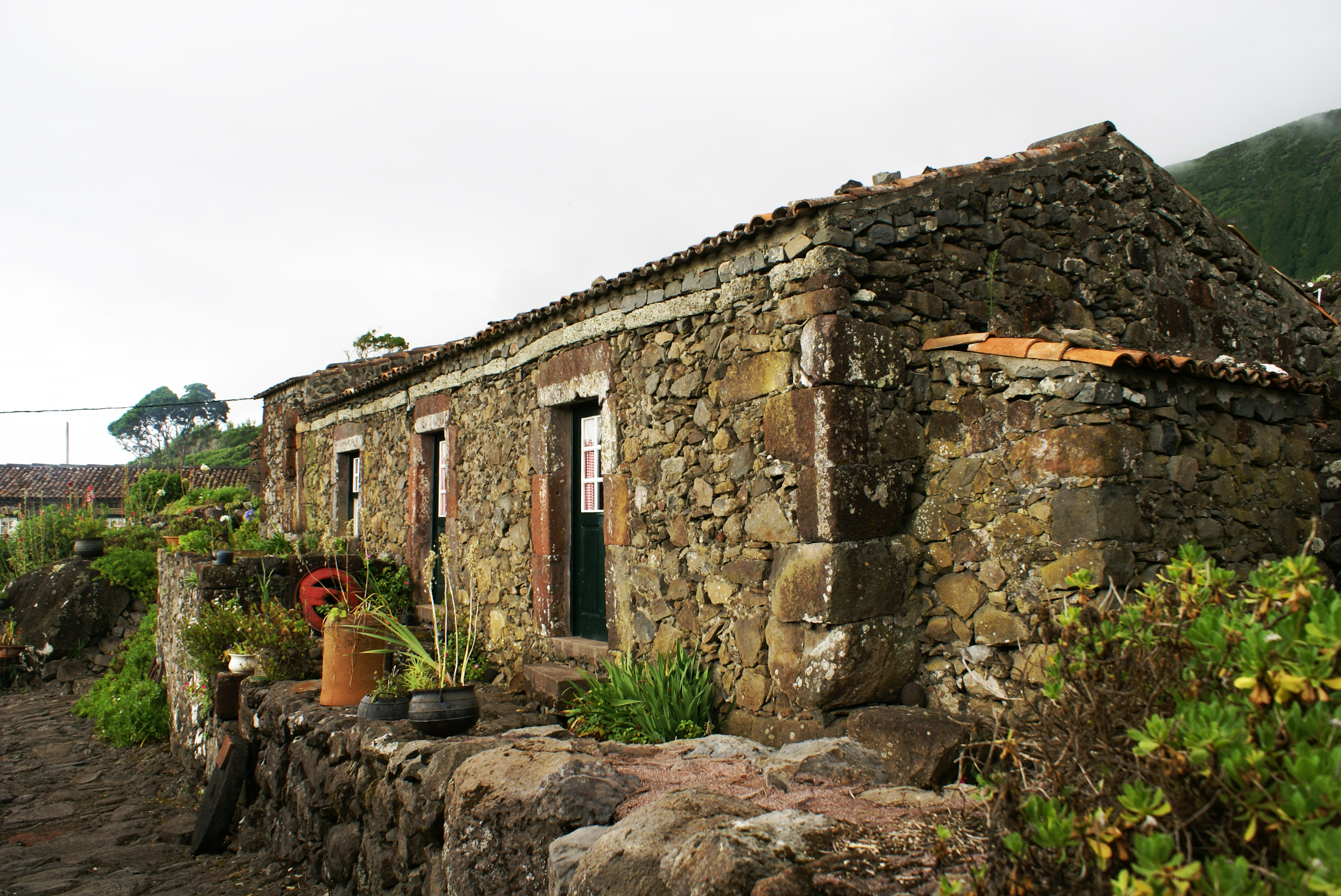 Quinta da Cuada, Turismo de Aldeia, Fajã Grande, ilha das Flores, Açores, Arquivo de Villa Maria, Ilha Terceira, Açores